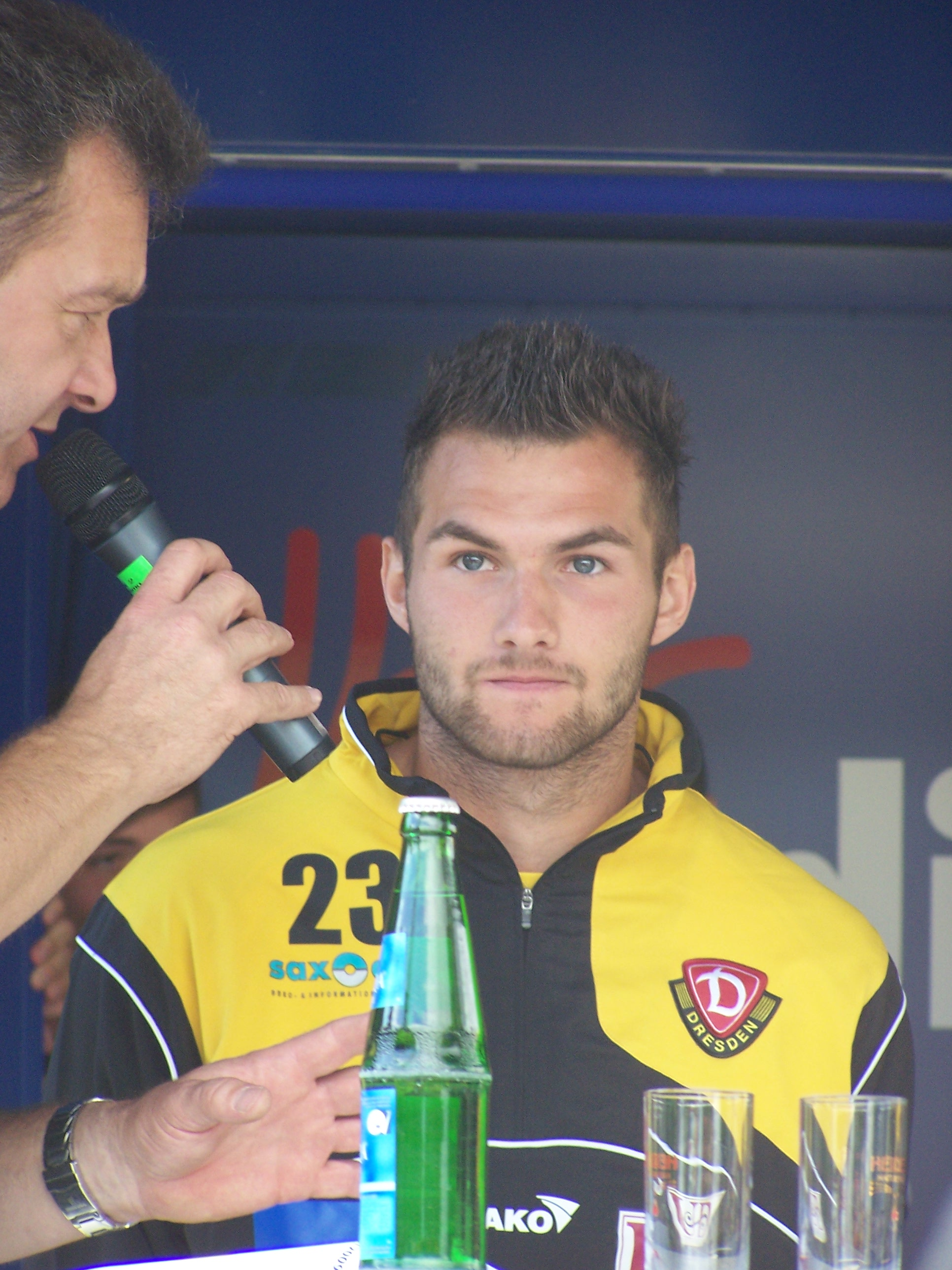 Sascha Pfeffer bei der Teampräsentation von Dynamo Dresden zum Start der Drittliga-Saison 2008/09